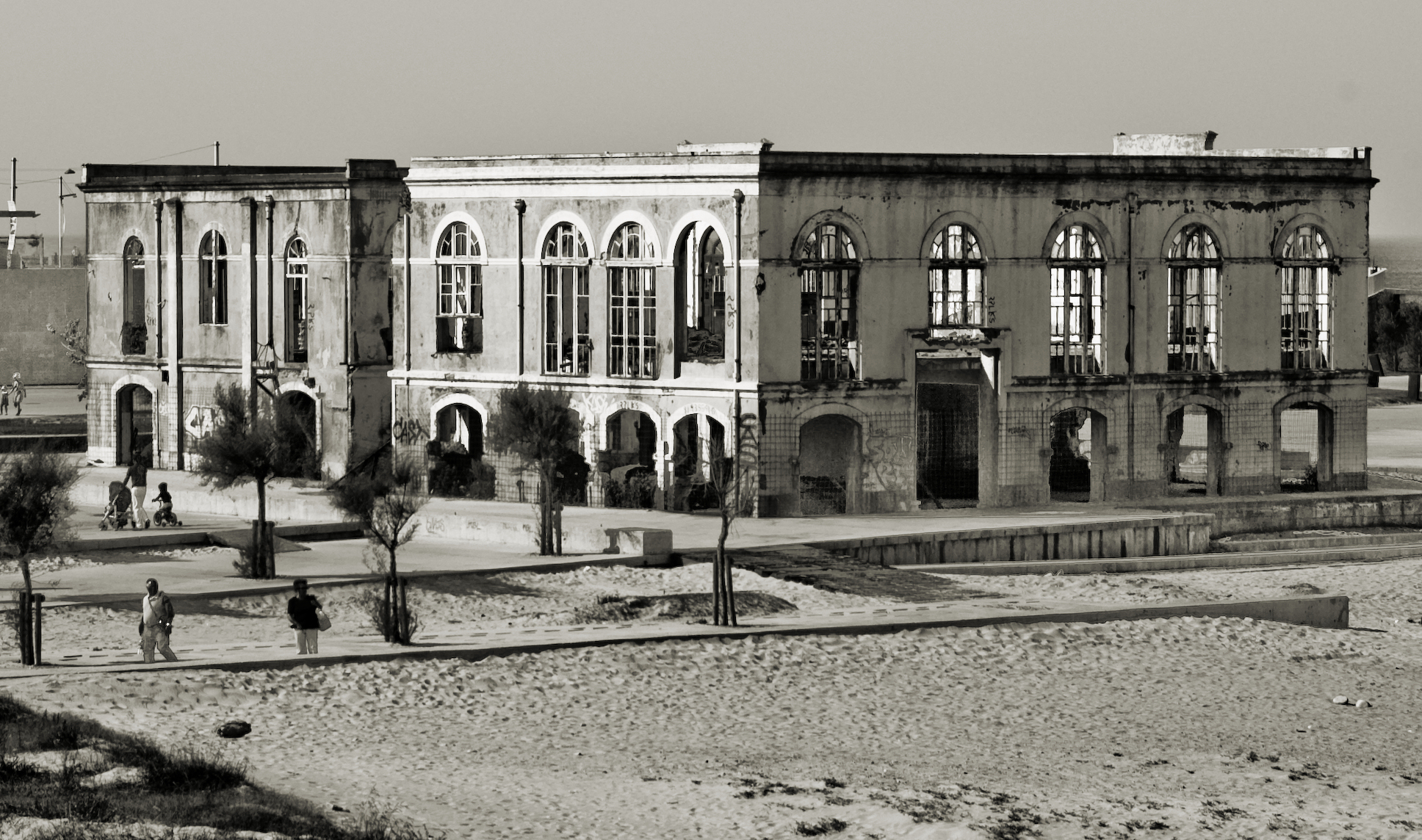 Perto do Castelo do Queijo: (1912-1974) Antiga subestação do Castelo do Queijo de fornecimento de energia eléctrica dos STCP, e durante algum tempo também albergou o Departamento de Via e Obras; (1989-1998) Antigas instalações do Colégio Luso Internacional do Porto (CLIP). No Porto, Nevogilde, Esplanada Rio de Janeiro.